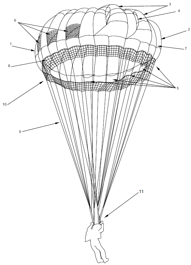 Zeichnung der Hauptkappe des MC-6 aus dem Technical Manual.